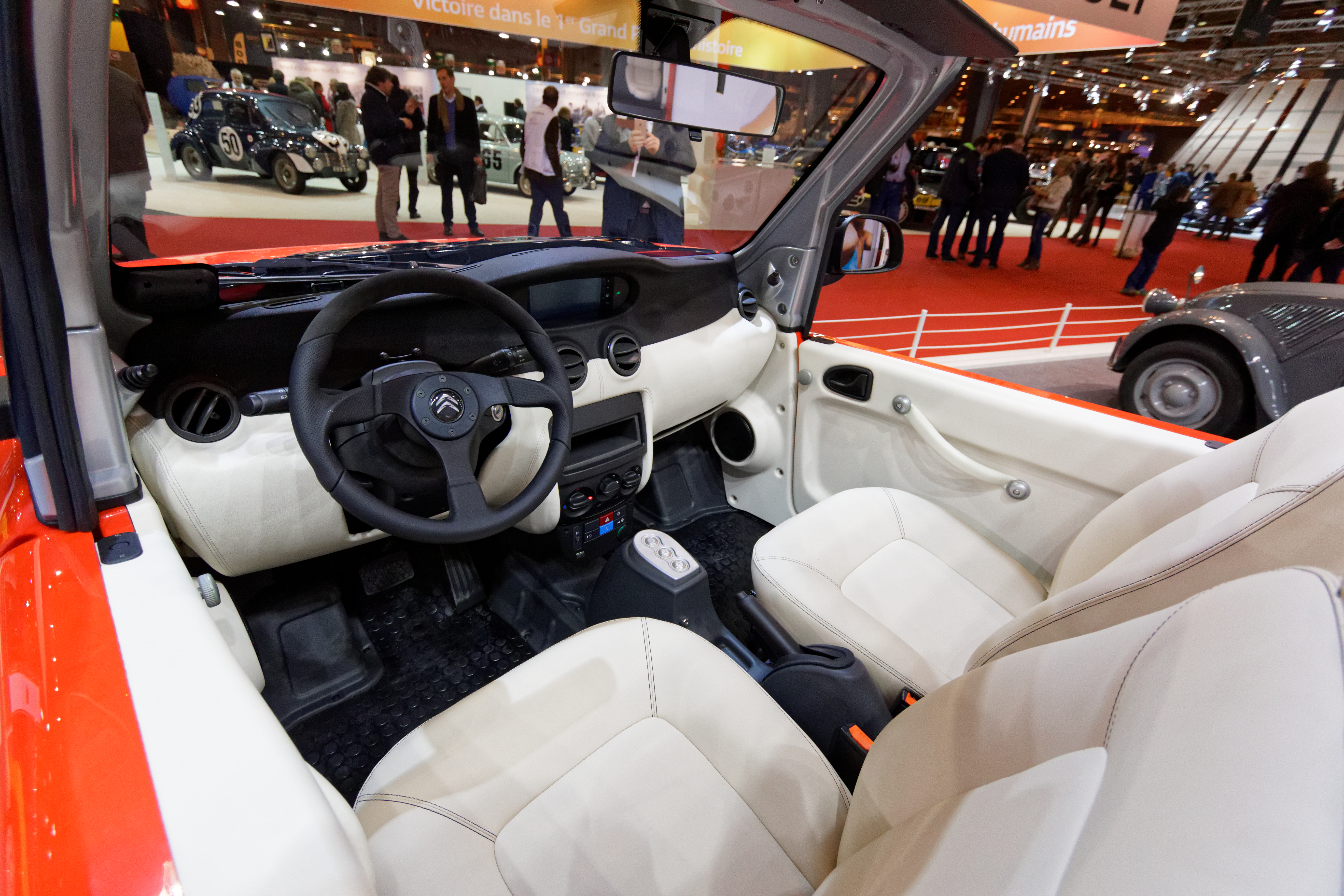 Une Citroën e-Méhari de 2016 exposée lors du salon Rétromobile 2016.